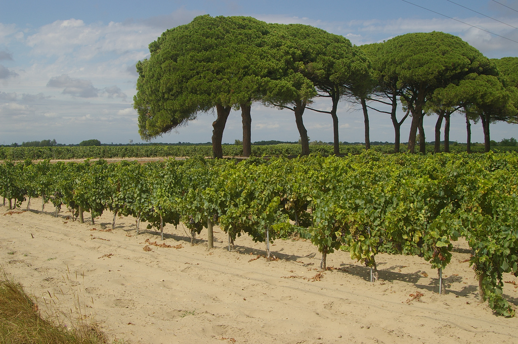 Vignes et pinède dans les sables en Camargue